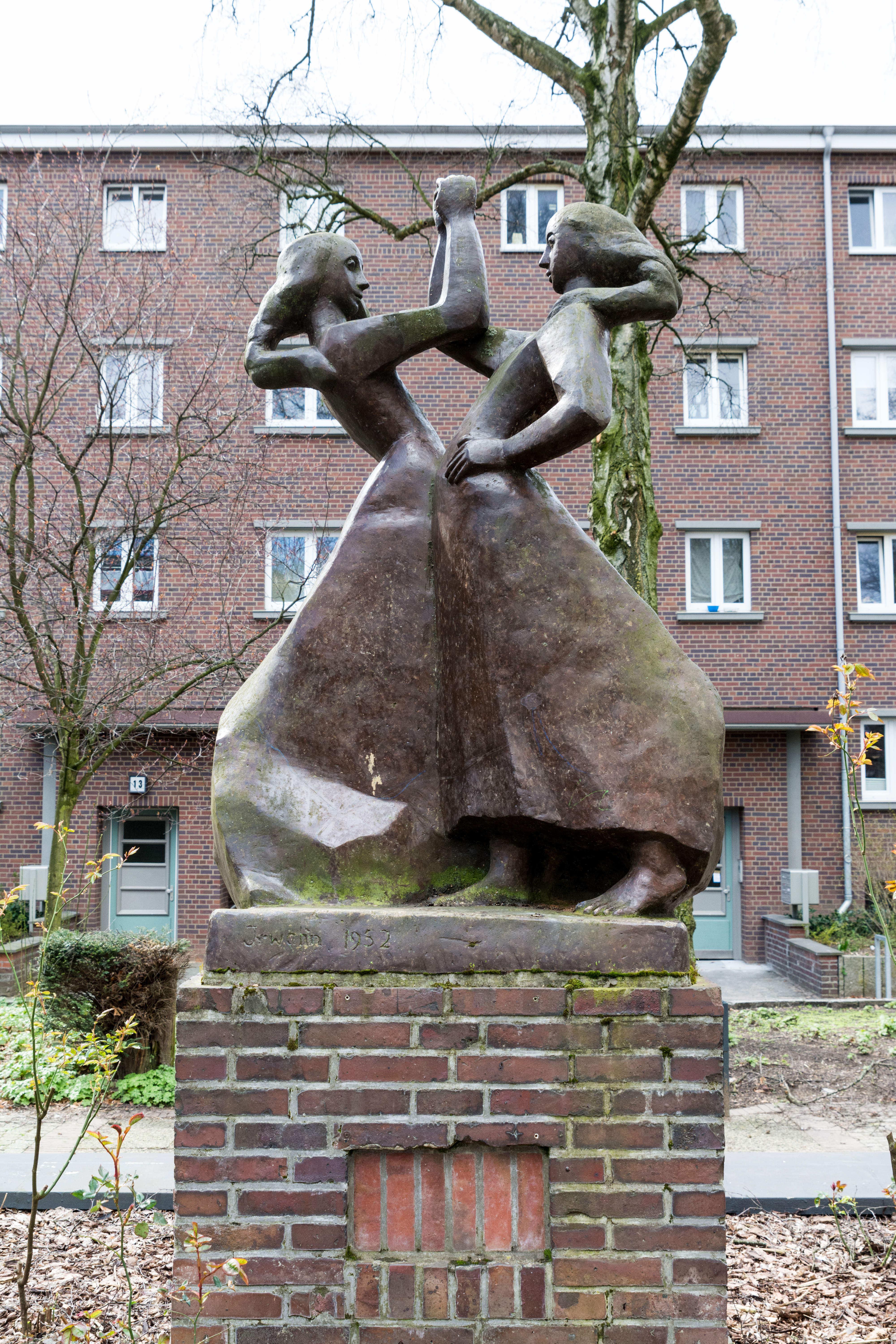 Naumannplatz-Siedlung in Hamburg-Dulsberg: Skulptur Tanzende Mädchen von Martin Irwahn auf dem Naumannplatz. This is a photograph of an architectural monument.